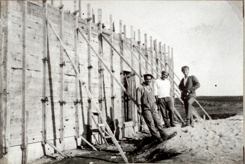 בניית בתי ההתיישבות החדשה בבית חנן House Construction in Beit Hanan